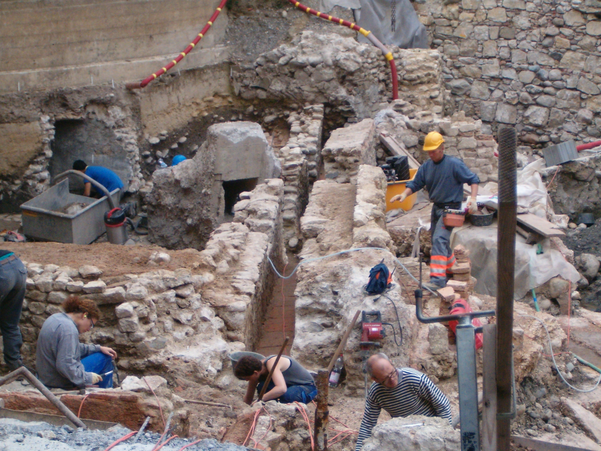 Archäologische Arbeiten im Bäderquartier Baden.